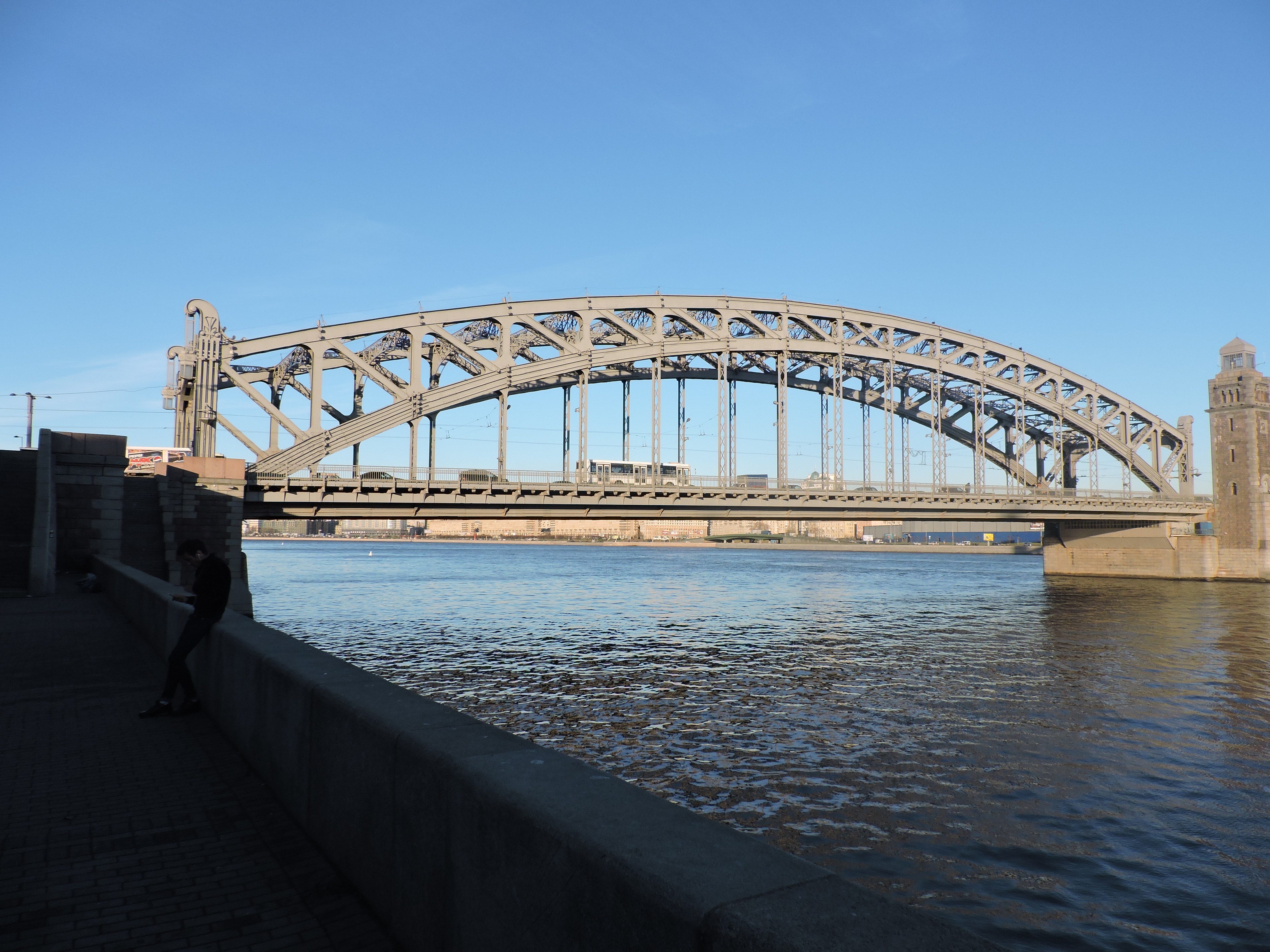 Левобережная арка Большеохтинского моста